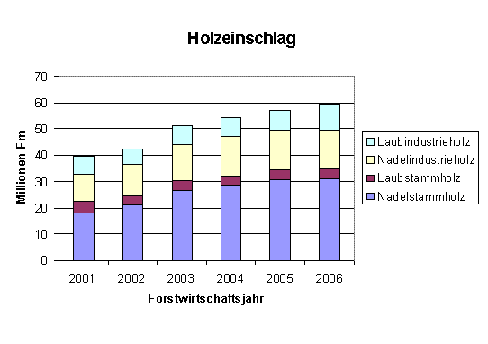 Holzeinschlag Deutschland (Datenquelle: ZMP Zentrale Markt- und Preisberichtsstelle GmbH)